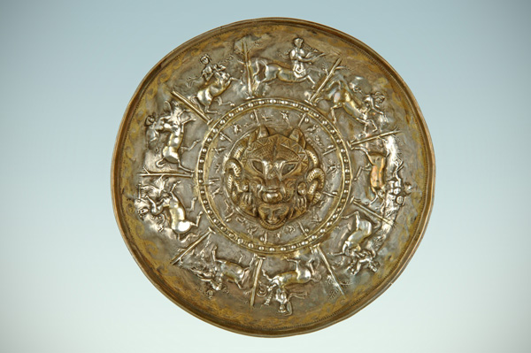 Pátera íbera de Perotito (Cultura Ibérica). Número de inventario: 1917-39-1.